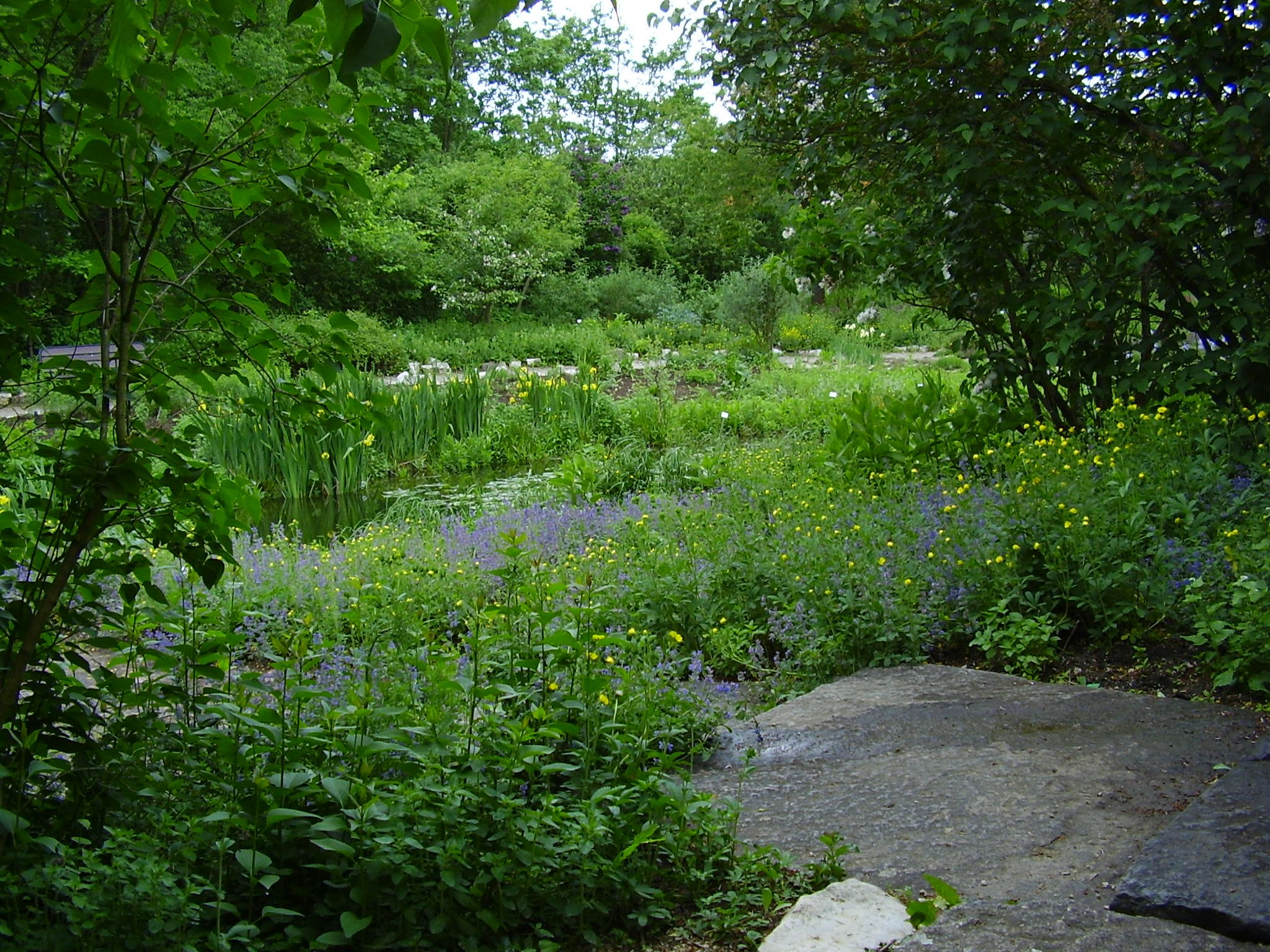 Aroma Garden